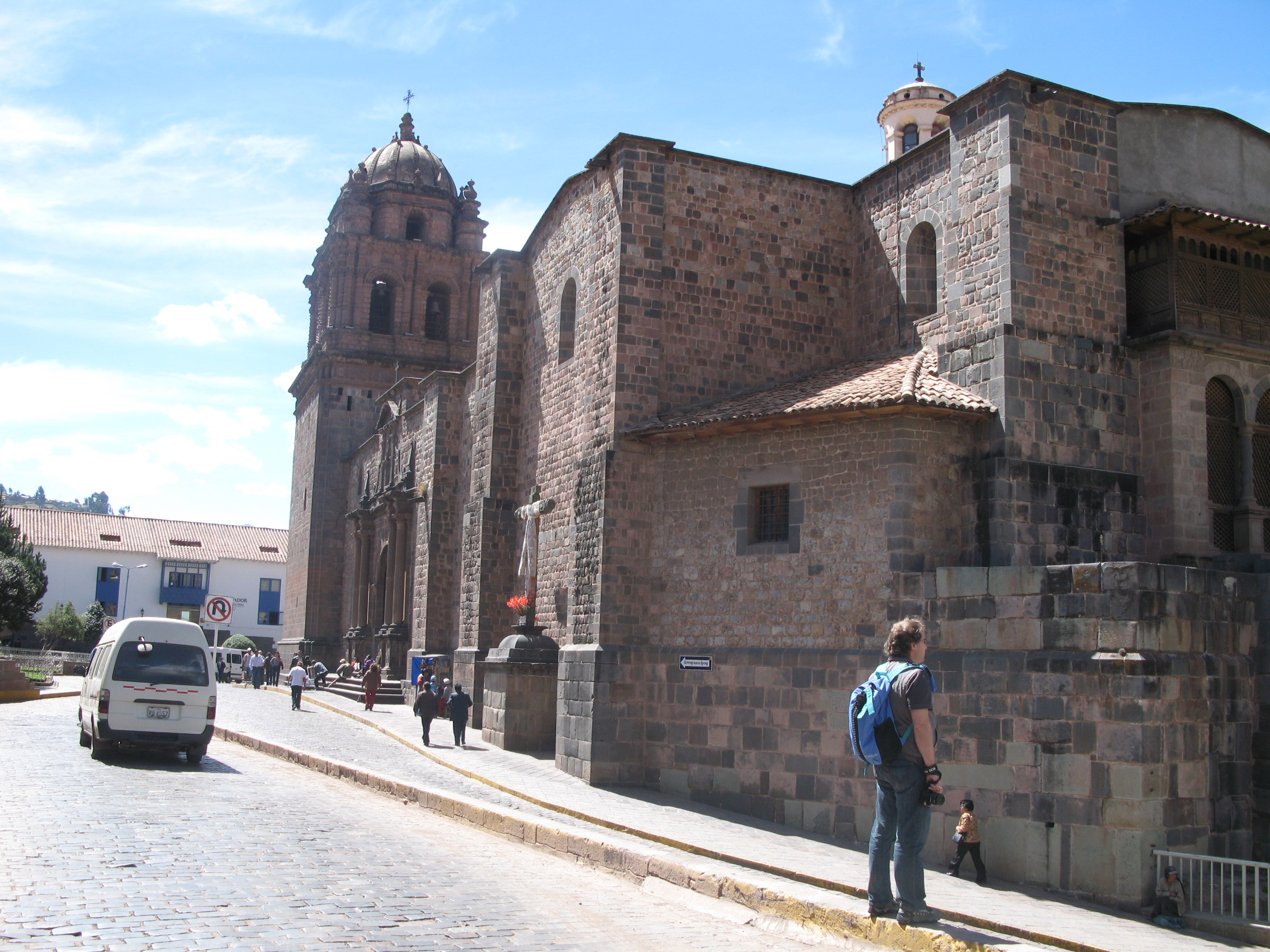 Cerkev in samostan in samostan Santo Domingo zgrajena na temelju templja Coricancha.